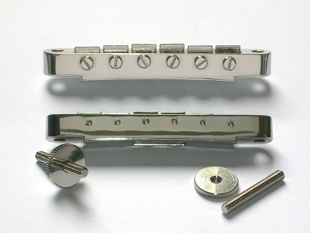 Cordier Tune-o-matic Classique